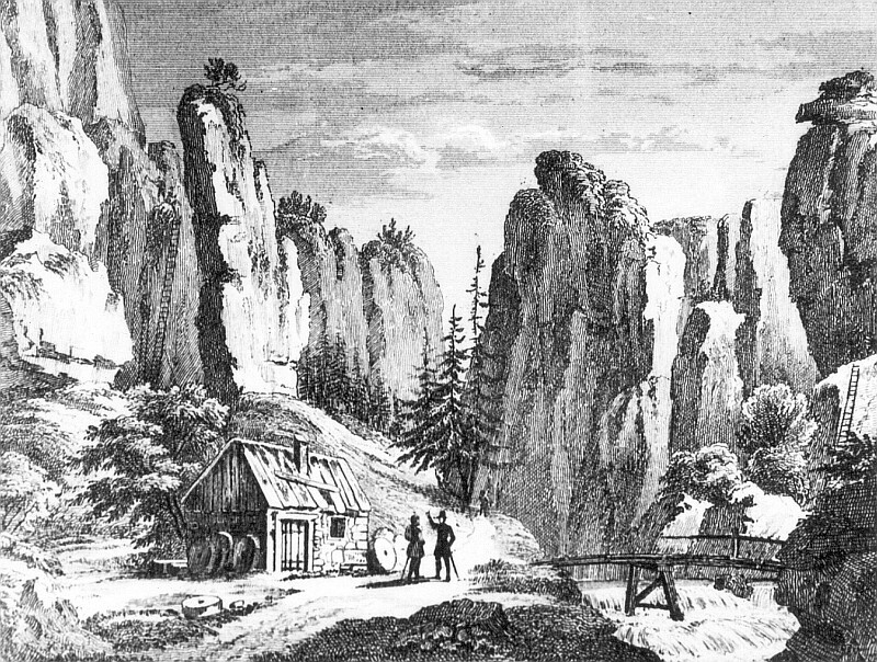 Original image description from the Deutsche FotothekPirna-Liebethal. Liebethaler Steinbrüche, aus: Schiffner, Albert: Beschreibung von Sachsen, 1845